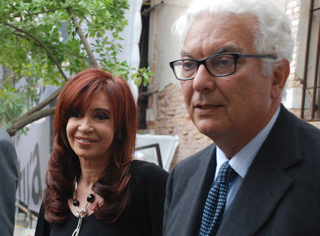 La Presidenta de la Nación Cristina Fernández de Kirchner con el Presidente de la Bienal de Venecia Paolo Baratta.